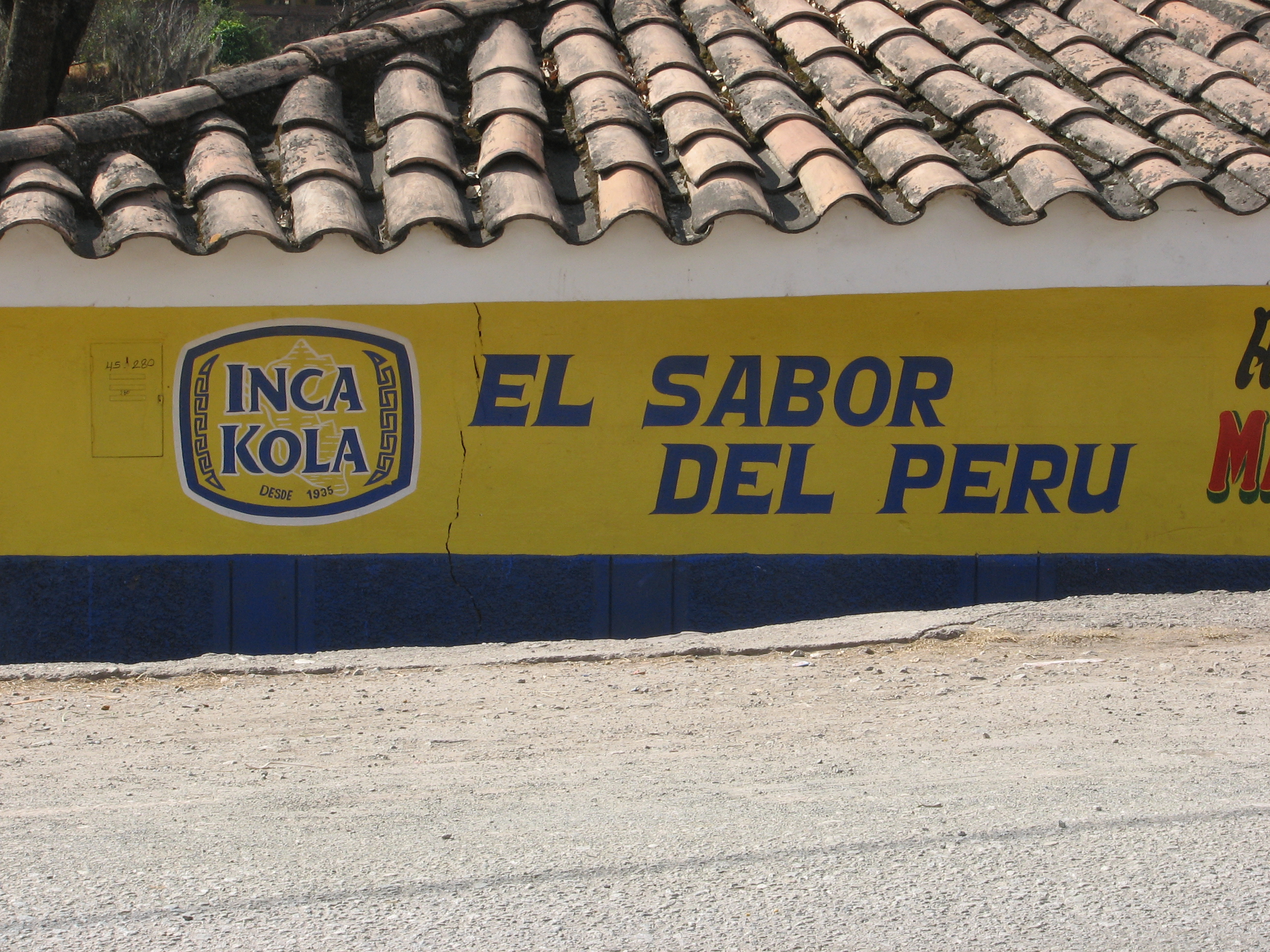 Inca Kola slogan "El Sabor del Peru" on a wall in Peru